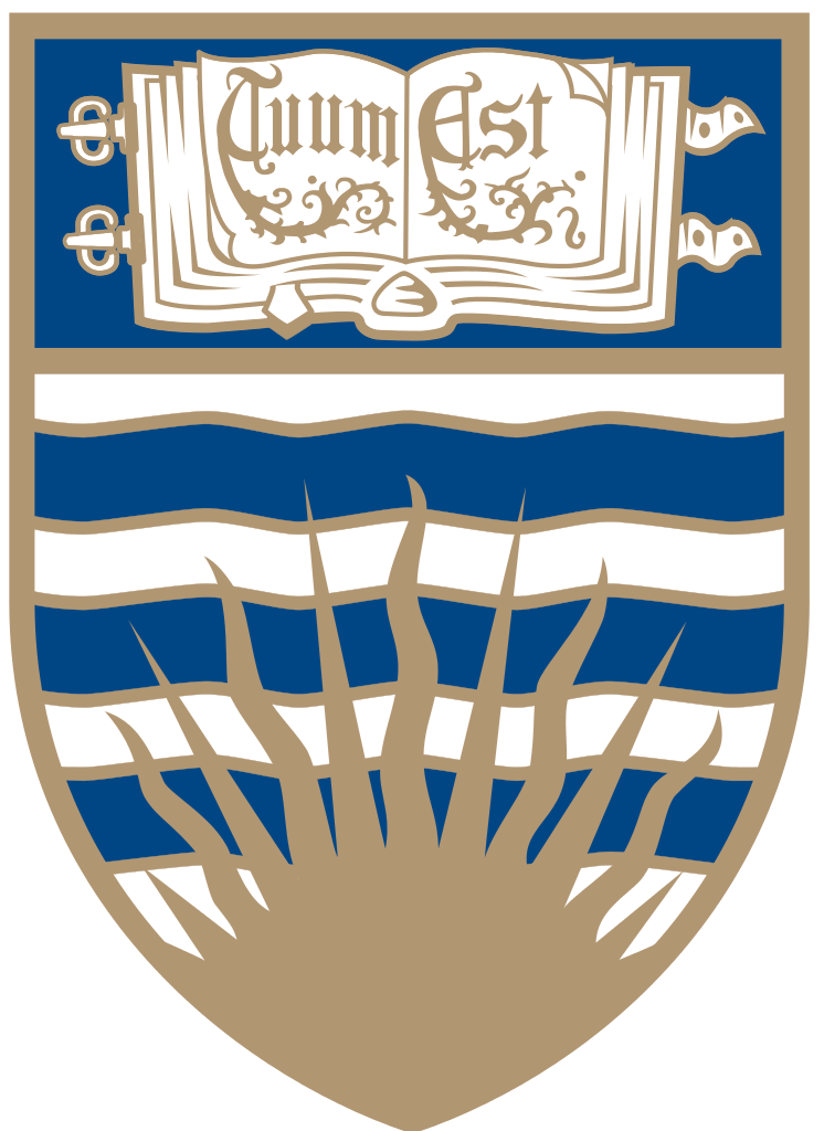 UBC COA, 1912